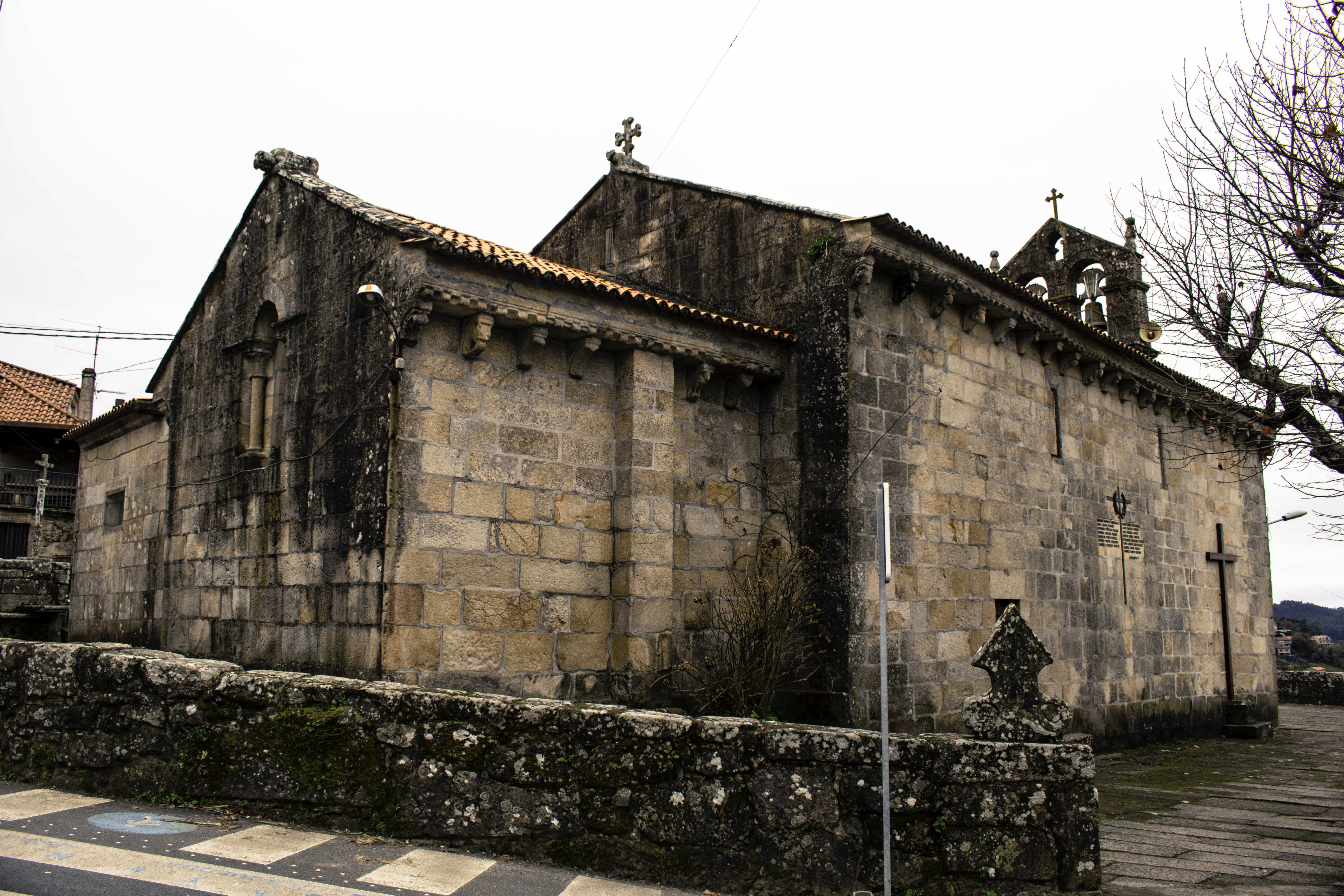 Igrexa de Cela, Bueu.